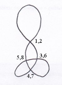 noeud avec code de gauss